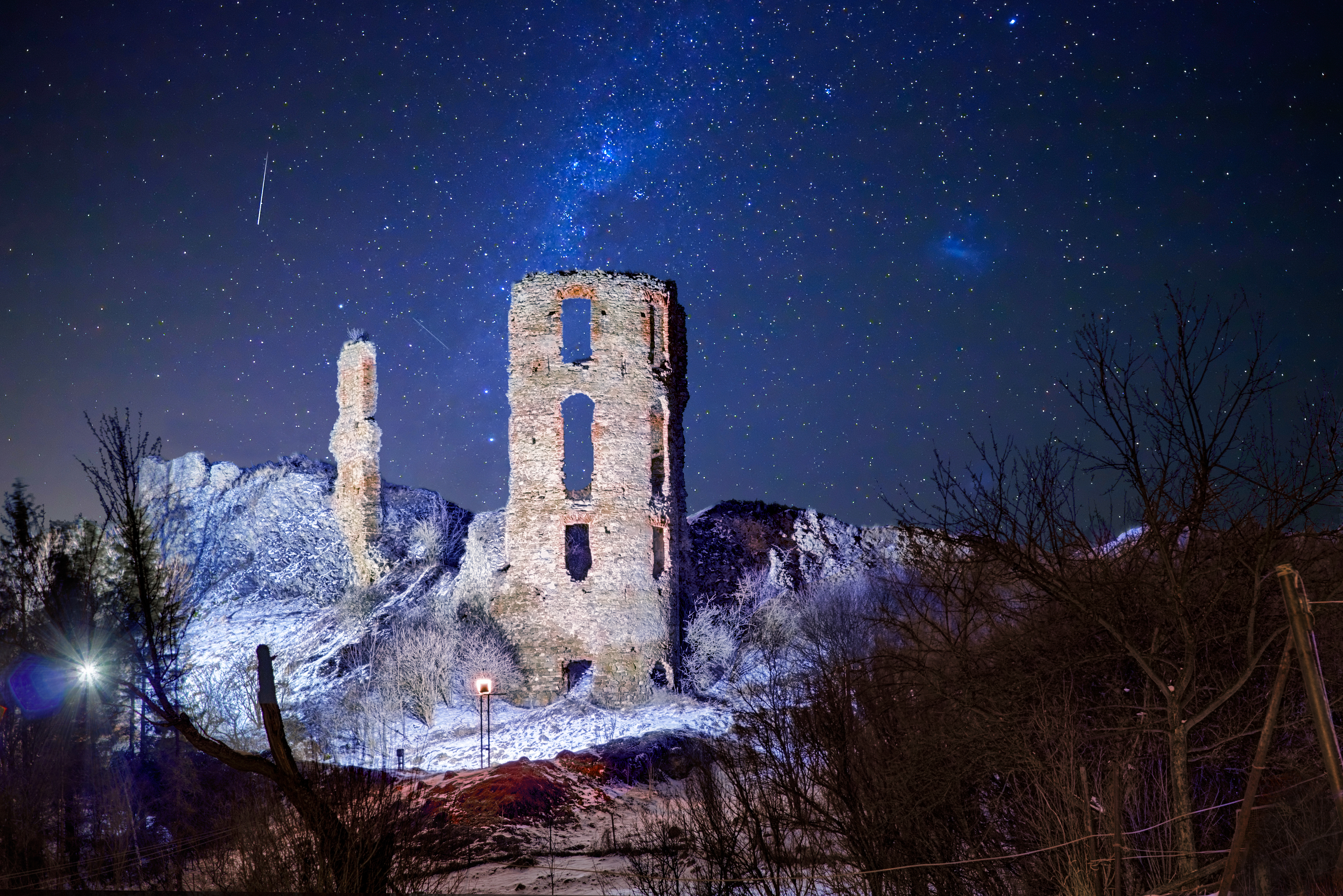 Plavečský hrad, v katastrálnom území obce Plaveč, okres Stará Ľubovňa. Prvé zmienky sú z roku 1294. V roku 1856 hrad vyhorel a odvtedy postupne chátral. Od roku 2014 prebiehoa jeho postupná konzervácia a obnova.